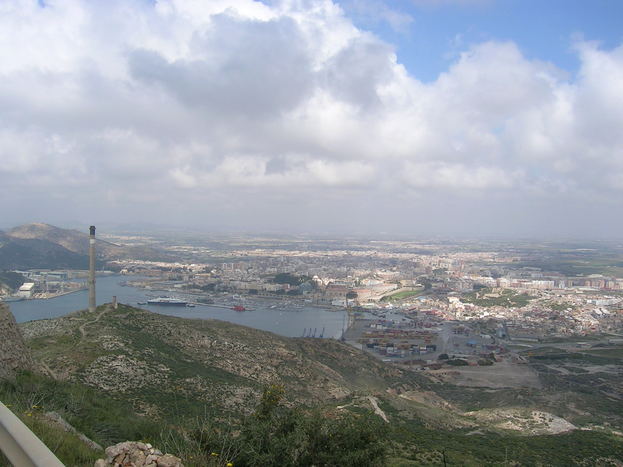 Vista de Cartagena desde San Julián